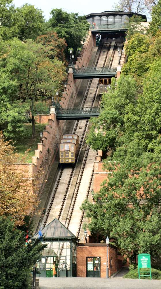 Budavári sikló (Budapest, I. ker., Clark Ádám tér)